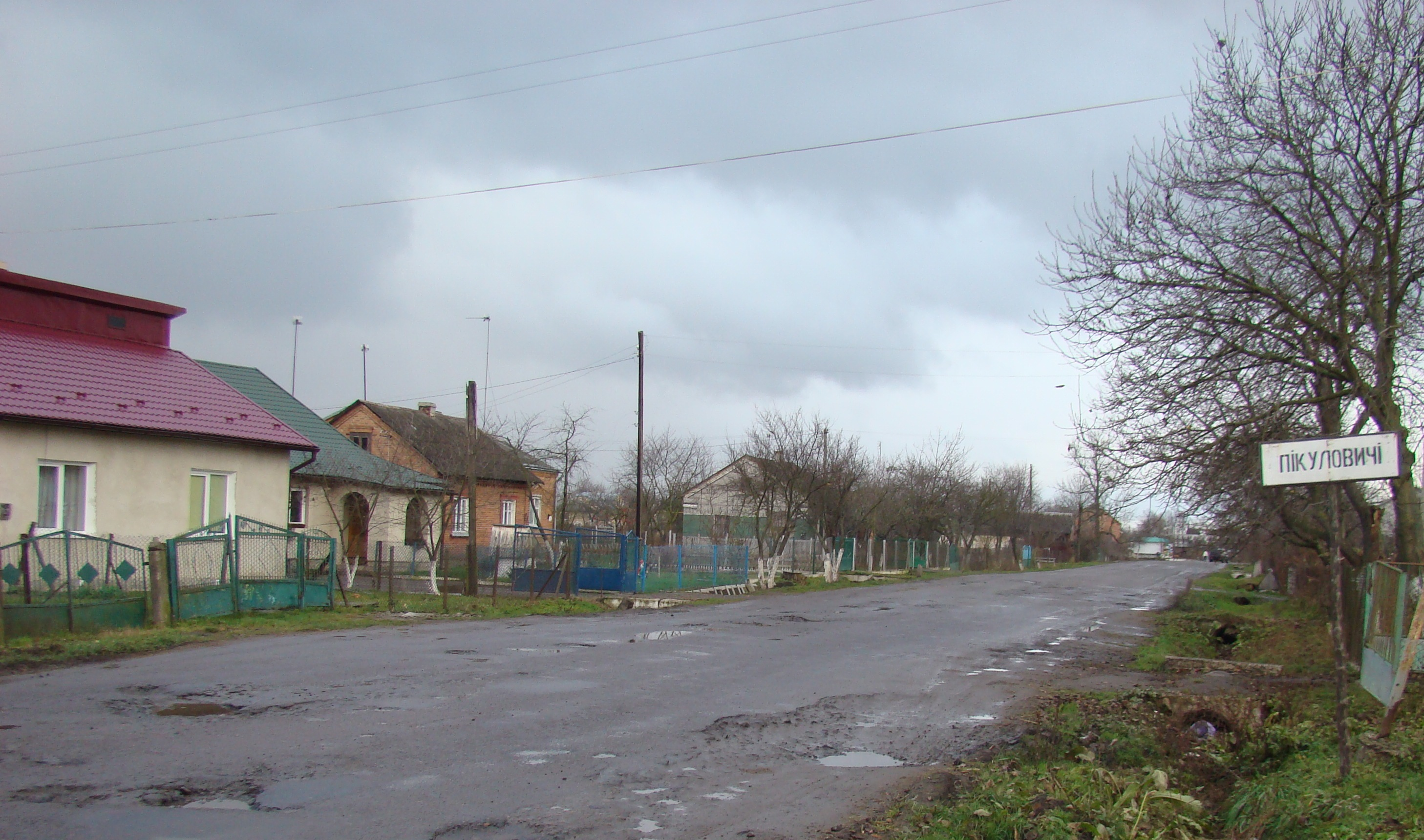 Вигляд села Пикуловичі.